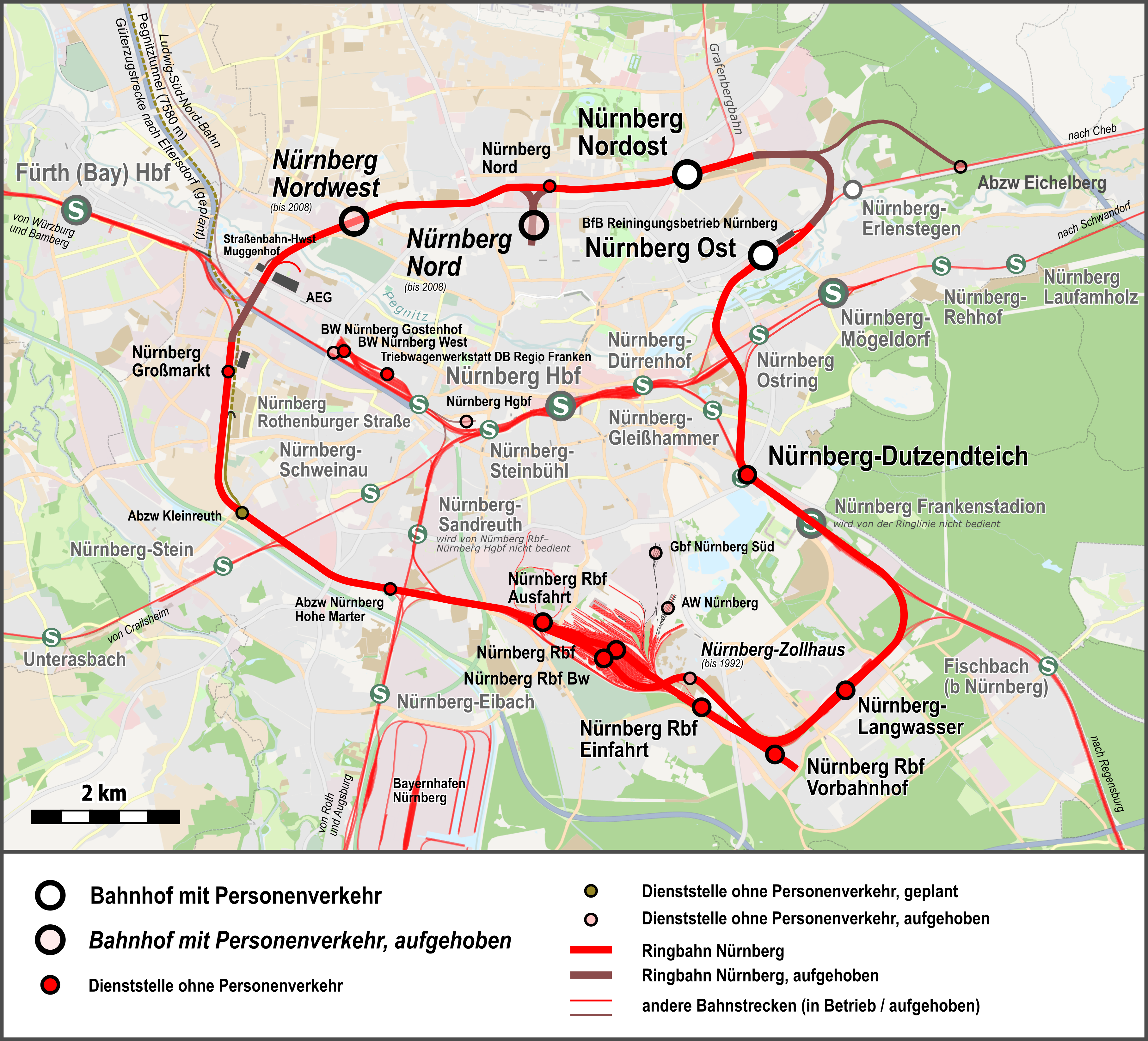 Verlauf der Ringbahn Nürnberg